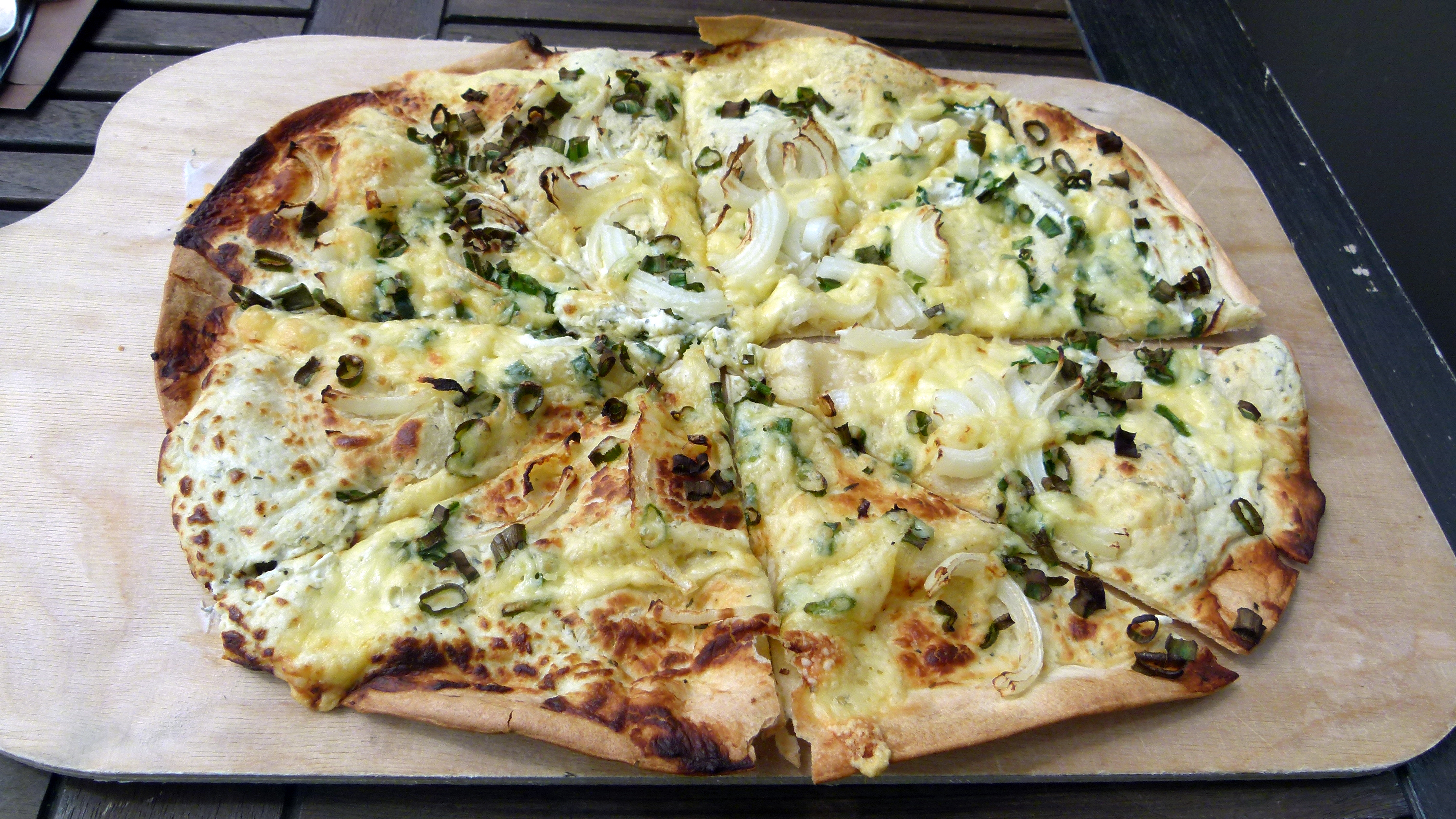 Elsässer Flammkuchen mit Schmand, Lauch und Zwiebeln, Restaurant Hotel am Münster, Breisach